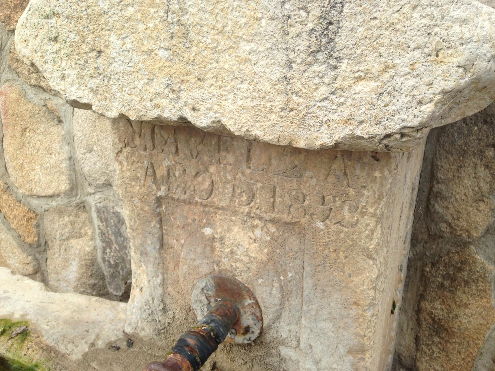 Inscripción sobre la fuente de Mesones (provincia de Guadalajara, España).